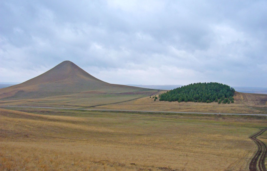 Гора Сусак-тау. Альшеевский район республики Башкортостан